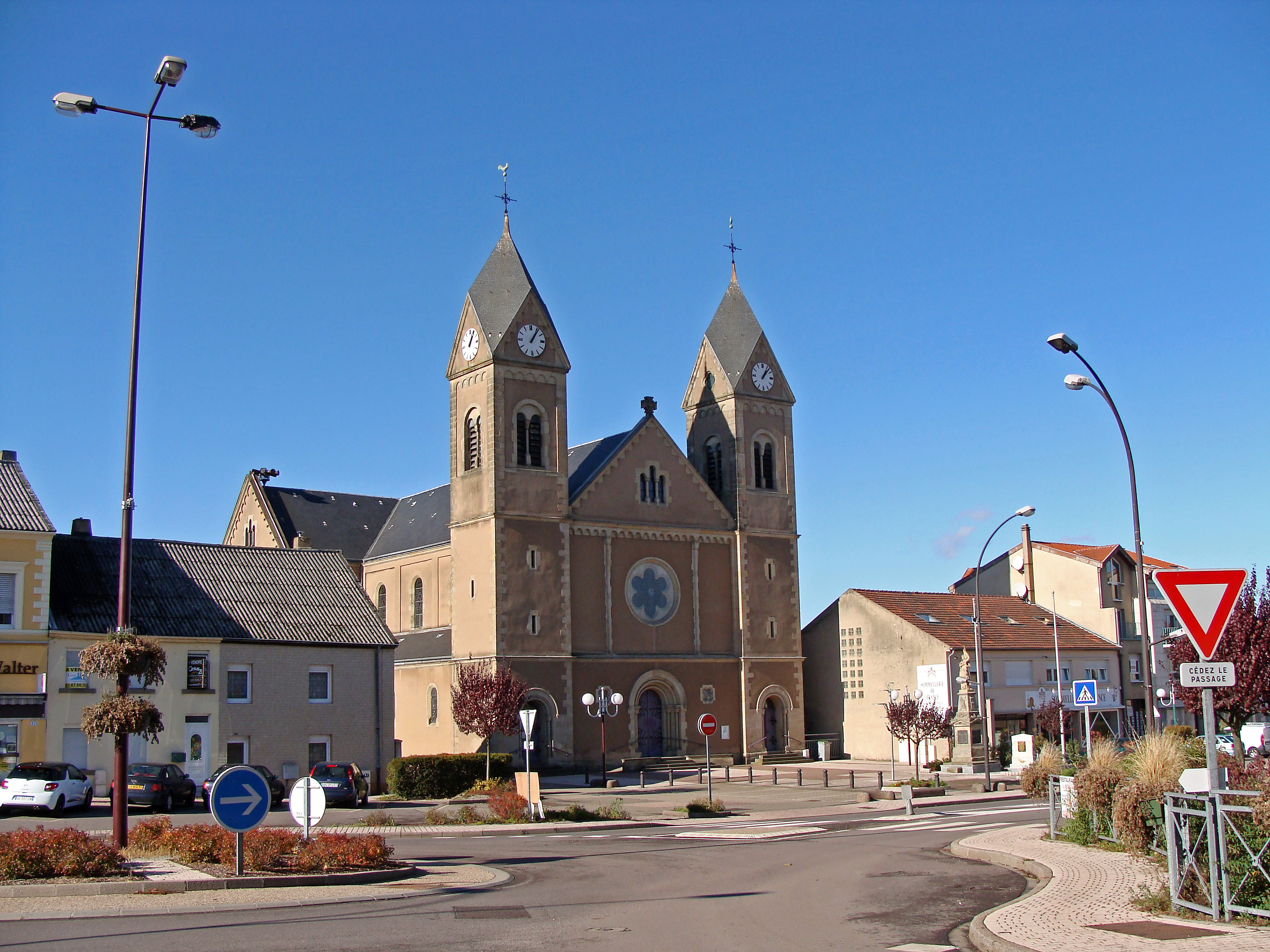 Carling place de l'église et église Saint-Gérard de Majella